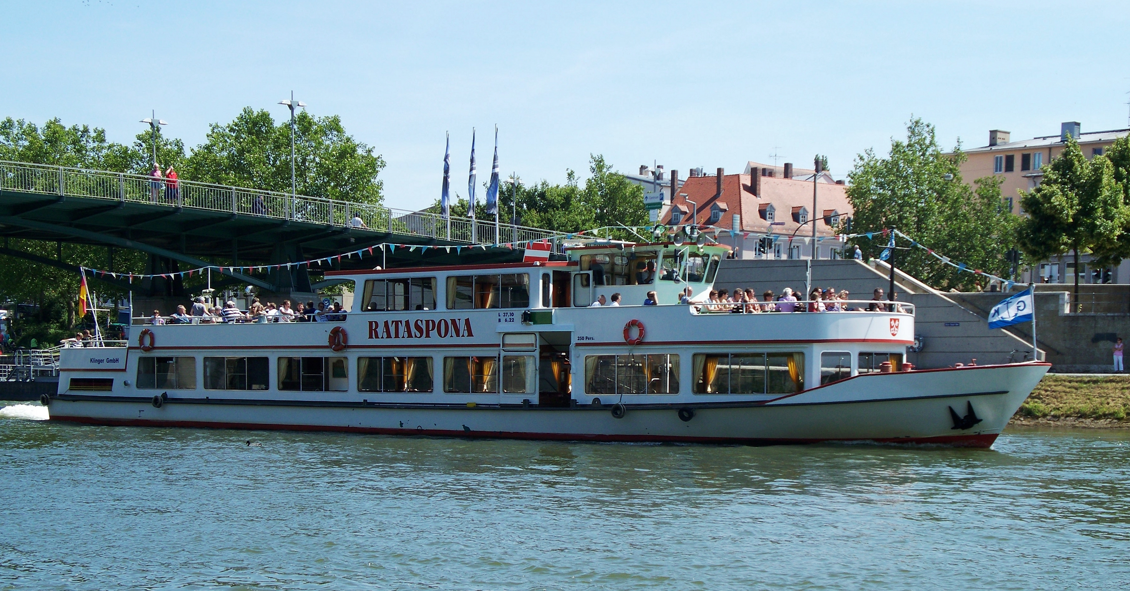 Das Passagierschiff "Rataspona" auf der Donau in Regensburg.